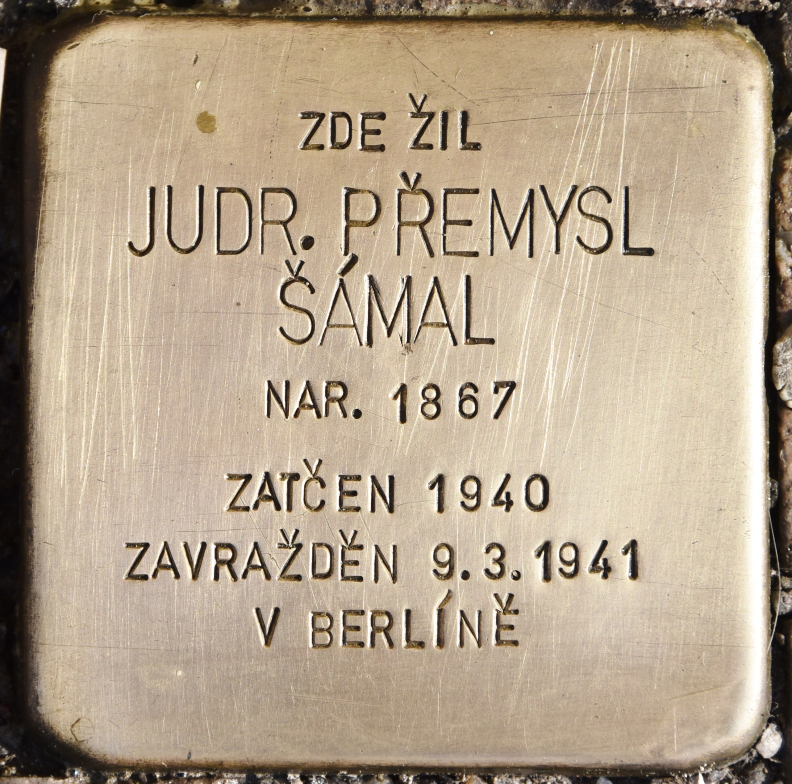 Stolperstein für Judr. Premysl Samal